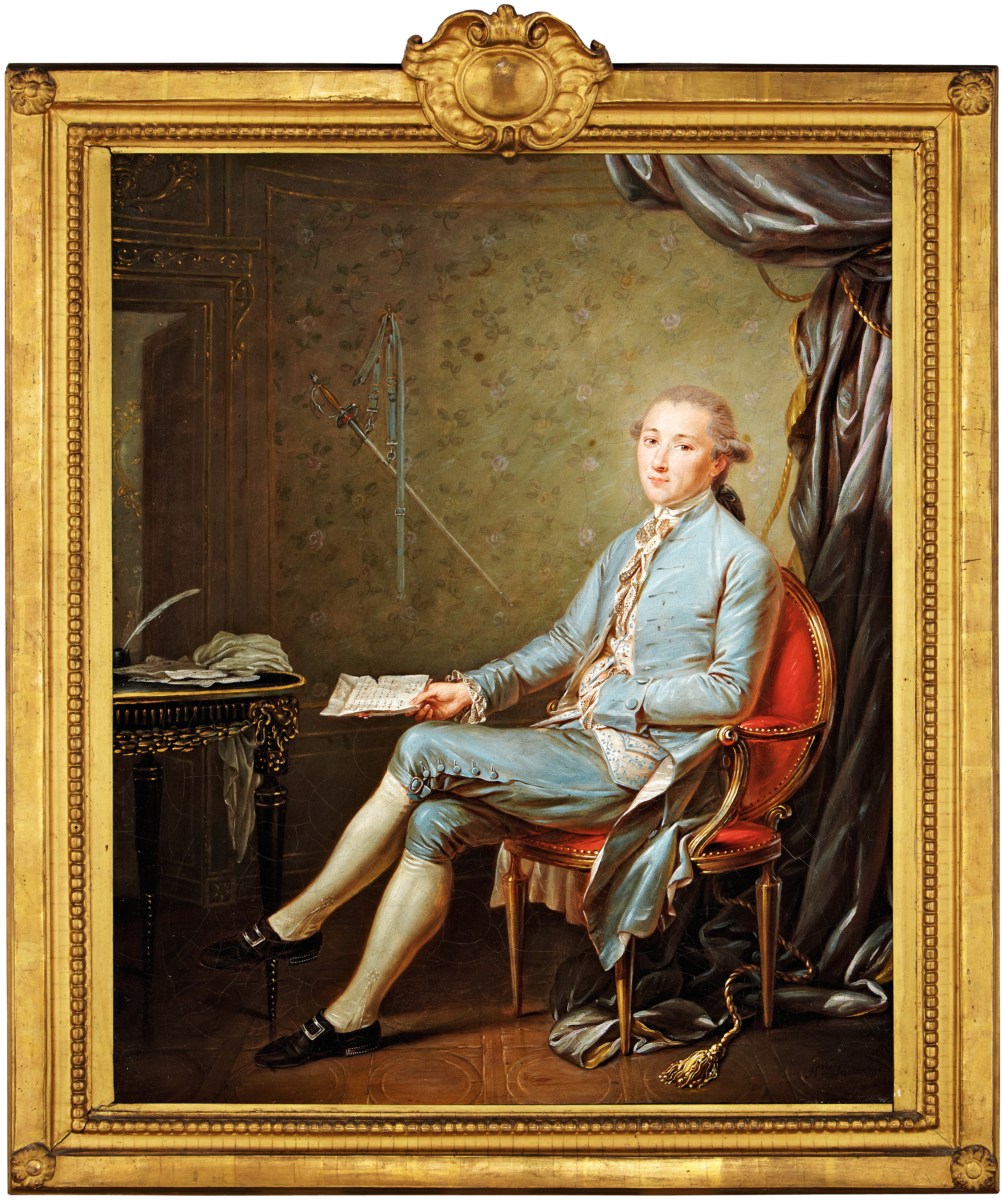 Johannes von der Mühll-Faesch (1754-1815), Nicolas LeJeune, 1778. Collection du Musée National Suisse, Zürich.